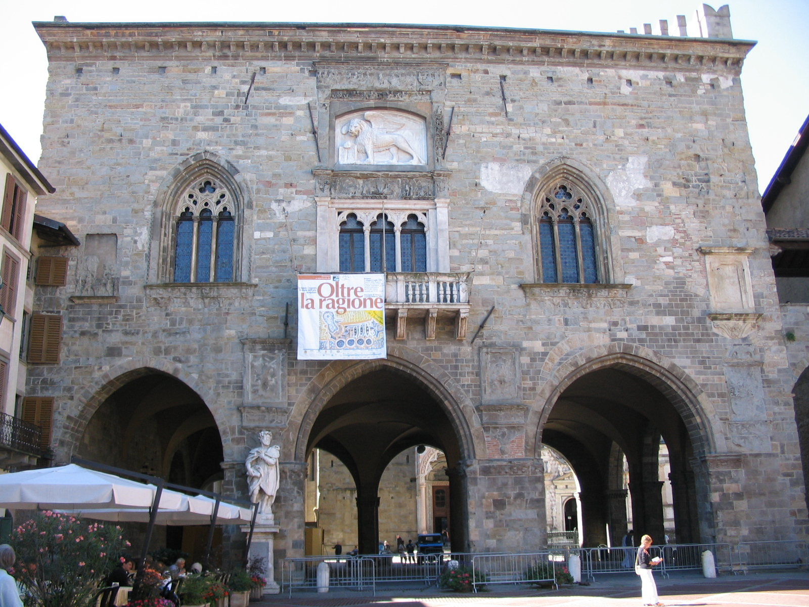 Autore Giorces. Bergamo, Palazzo della Ragione.